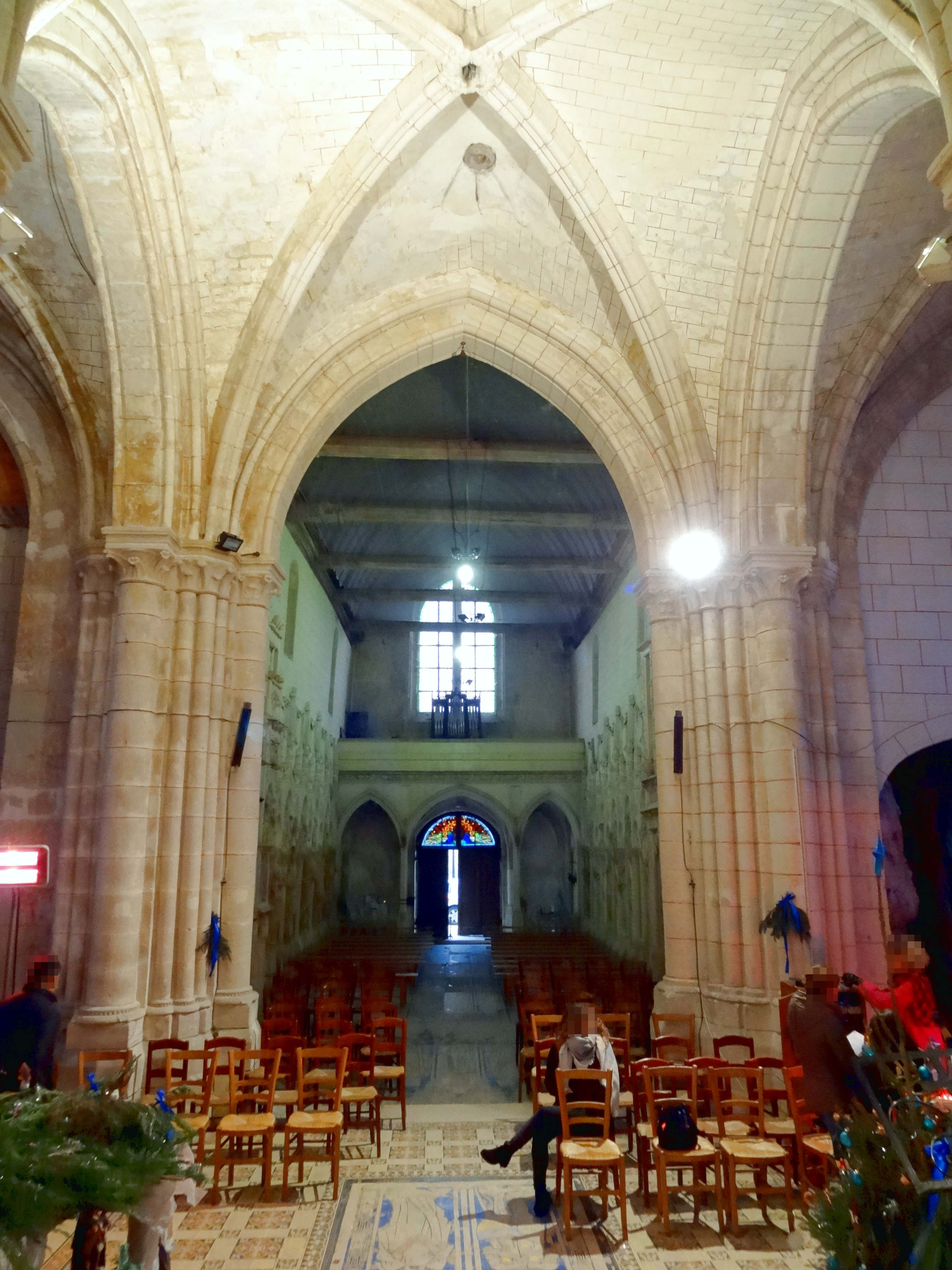 Intérieur de l'église - voir titre.